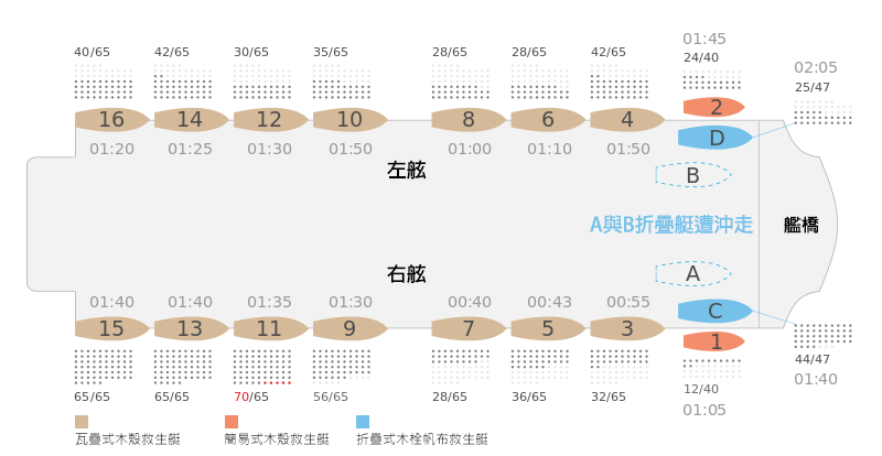 英國皇家郵輪鐵達尼號小艇甲板設計圖。顯示救生艇的位置。